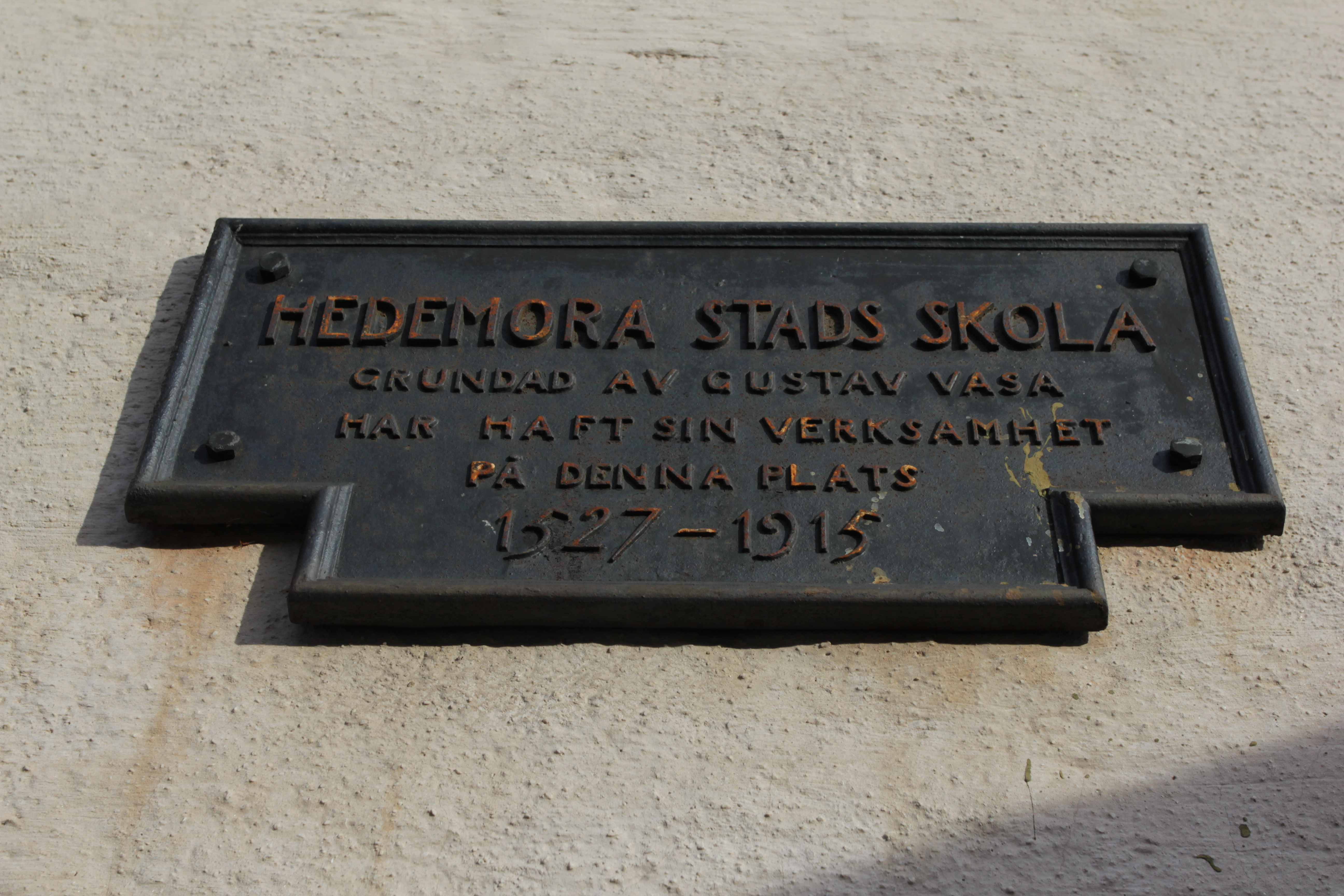 Skylten på Läroverket, Vasaskolan, Hedemora, Sverige, satt ursprungligen på den nedbrunna skolan vid Lagmansgården, på andra sidan gatan.